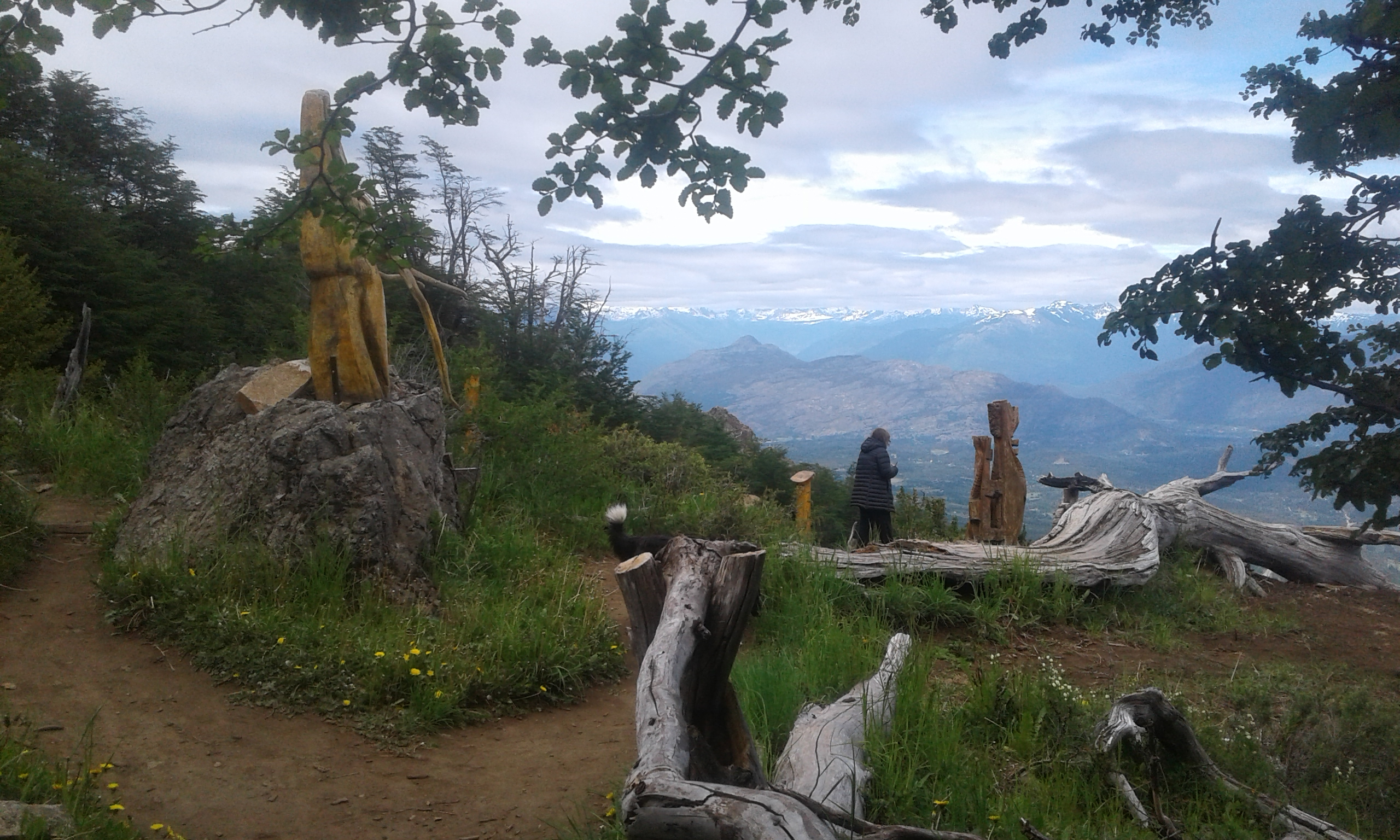 Vista parcial de los senderos del bosque tallado en el cerro Piltriquitron, El Bolson , Rio Negro, Argentina.